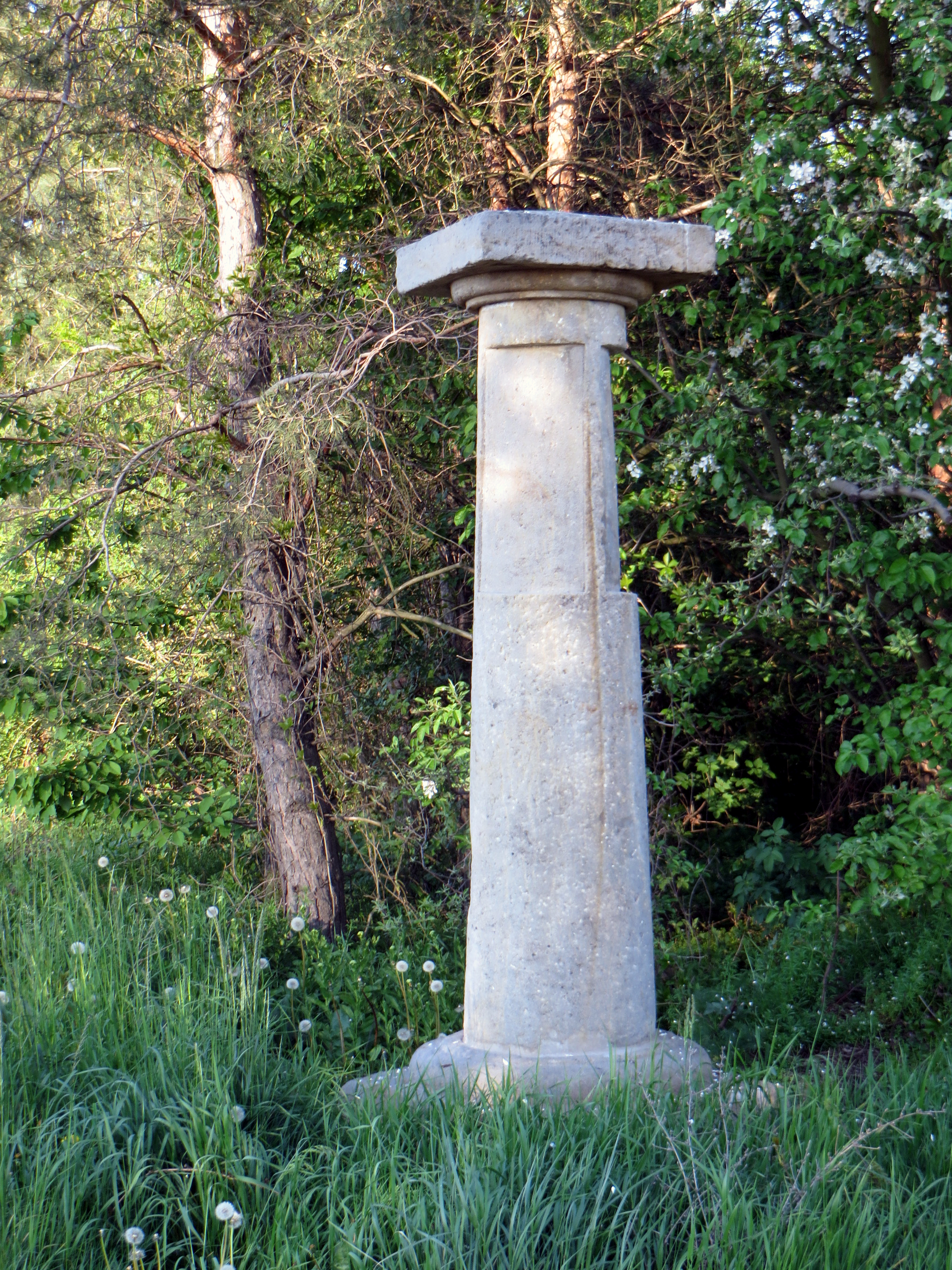 Rozcestník, U kopečků, Přední Lhota (Poděbrady).